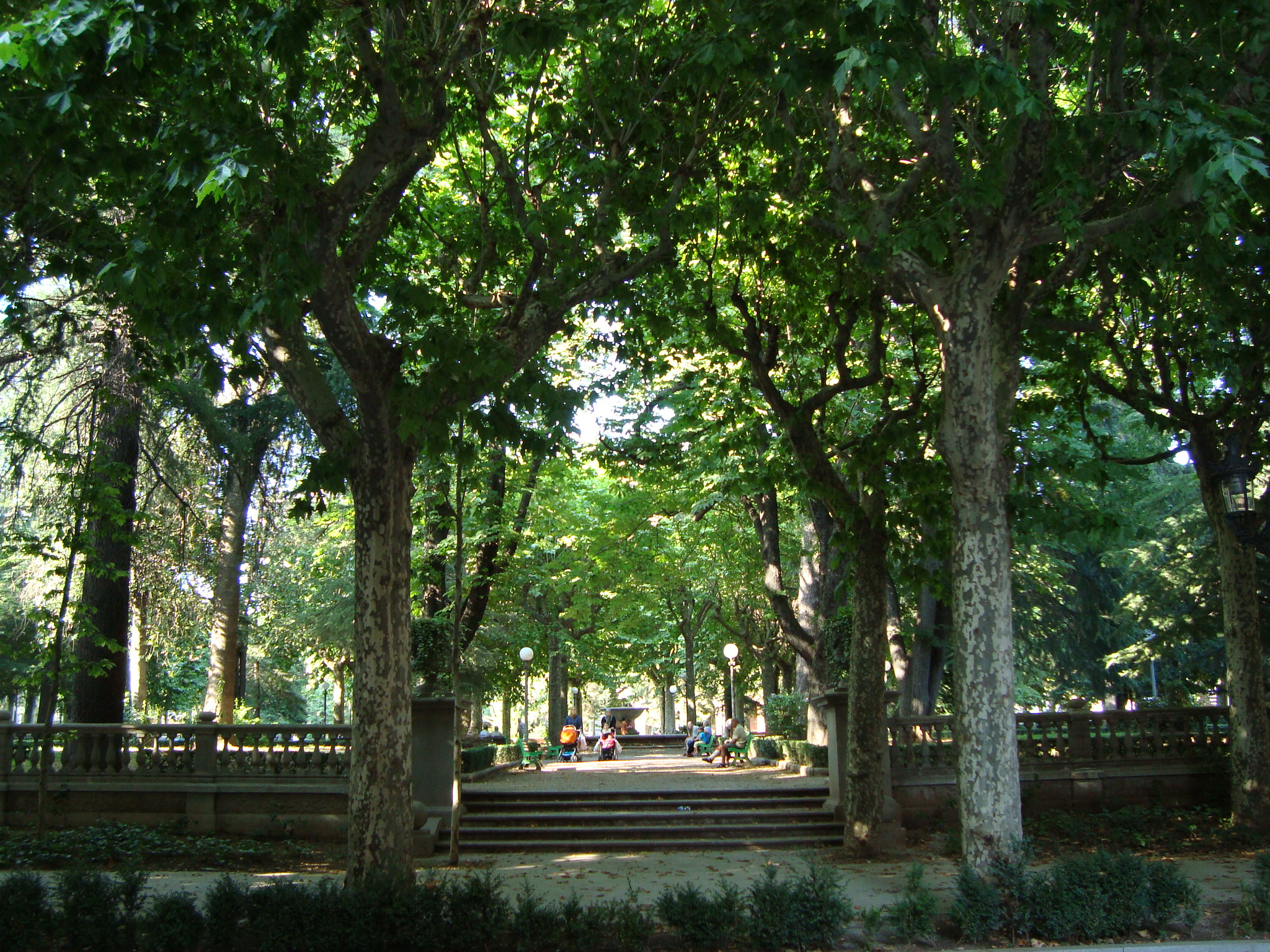 Vista d'Olot